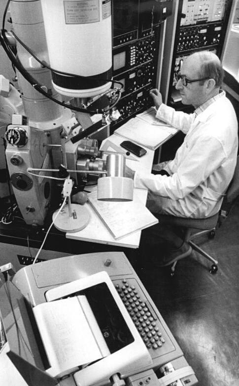 ADN-ZB-Thieme-27.8.82-Karl-Marx-Stadt: In enger Zusammenarbeit zwischen Wissenschaftlern und Technikern des Forschungsinstituts für Nichteisenmetalle Freiberg und dem VEB Bergbau- und Hüttenkombinat "Albert Funk" wurden neue Verfahren zur Aufarbeitung edelmetallhaltiger Sekundärrohstoffe entwickelt. So werden die vielfältigsten edelmetallhaltigen Rücklaufmaterialien verlustarm aufgearbeitet und der Industrie zurückgeführt. Den Wissenschaftlern stehen bei ihren Forschungsaufgaben hochwertige Geräte wie dieser Elektronenstrahl-Mikroanalysator zur Verfügung. Wolfgang Mehnert untersucht die Oberfläche metallischer Werkstoffe im Mikrobereich.